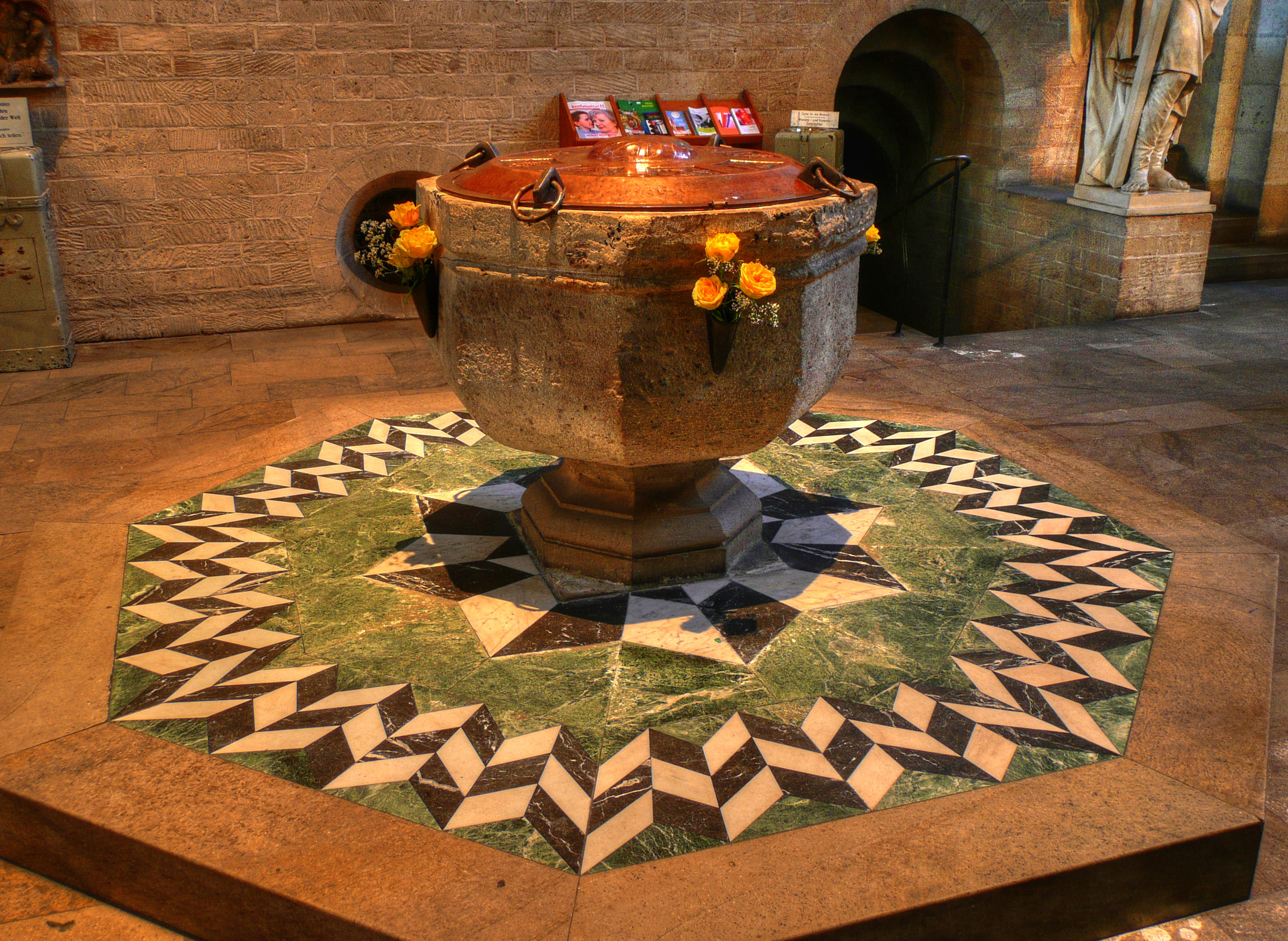 Taufbecken in der Kölner Kirche St. Aposteln)